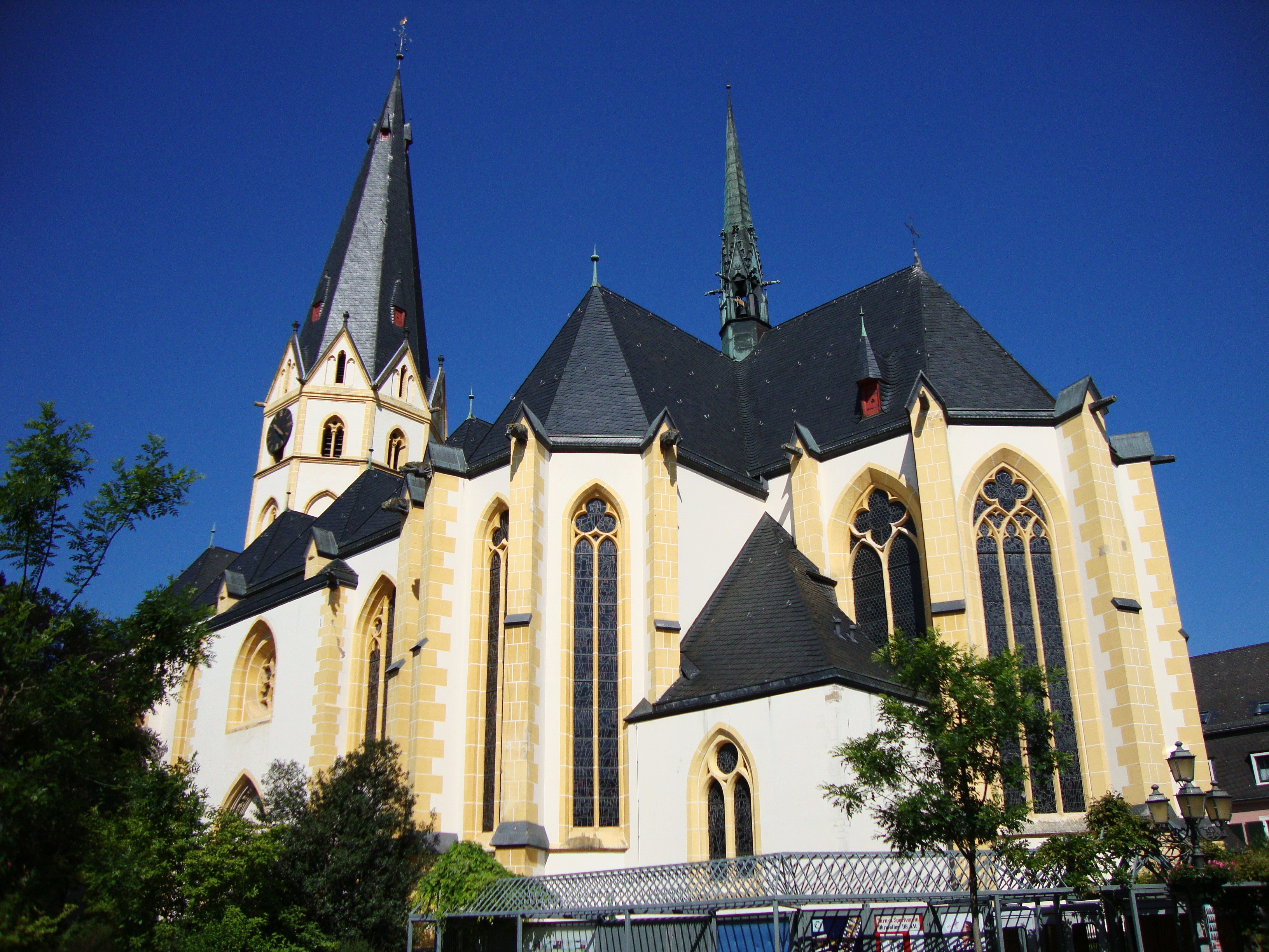 Kath. Pfarrkirche St. Laurentius in Ahrweiler